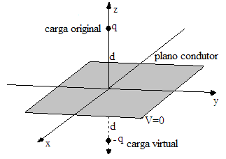 Caso clássico para aplicação do método das imagens, plano condutor aterrado